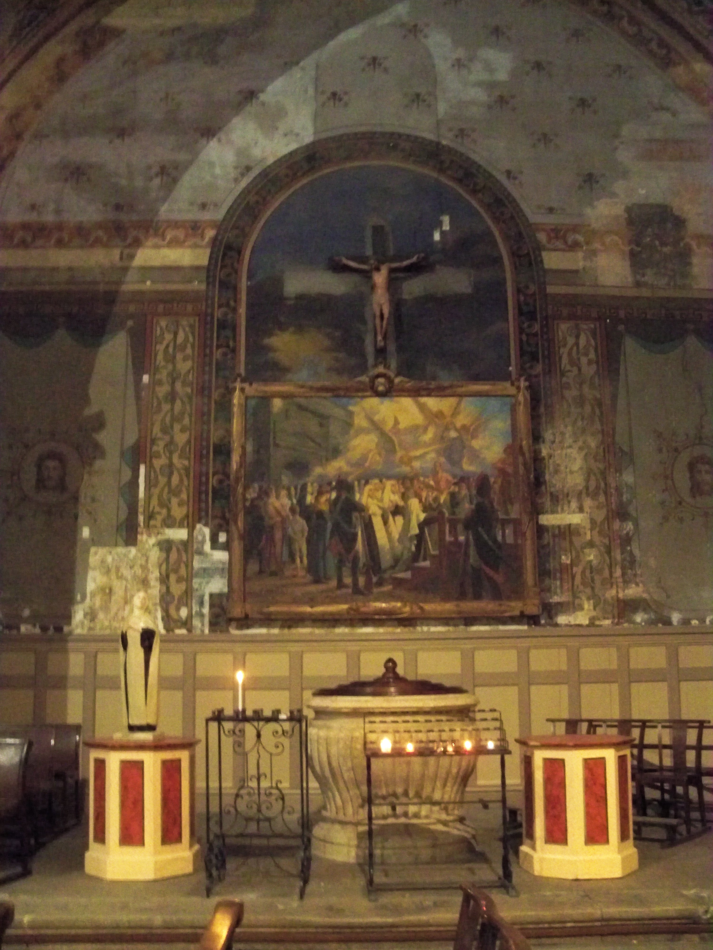 Chapelle latérale de Notre Dame de Nazareth, Orange, Vaucluse, France